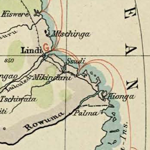 Wirtschaftsatlas der Deutschen Kolonien (Kartenausschnitt)